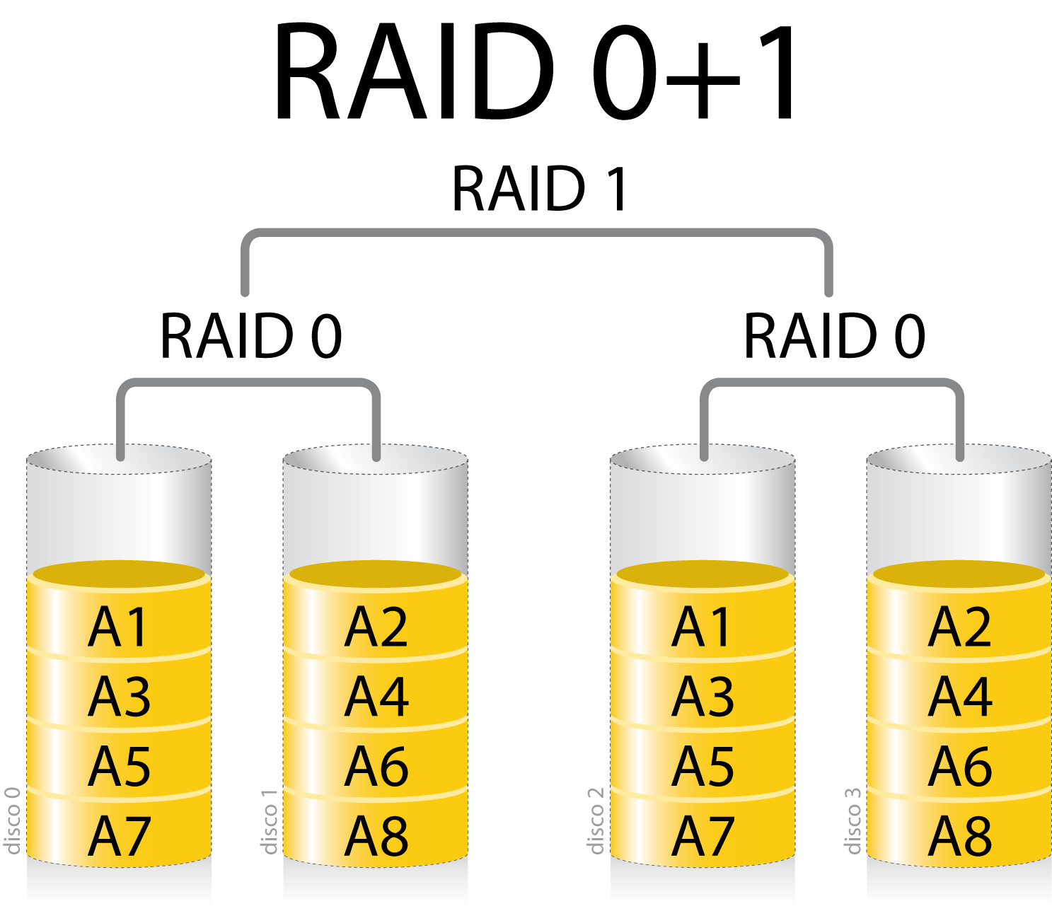 Esquema RAID 0+1